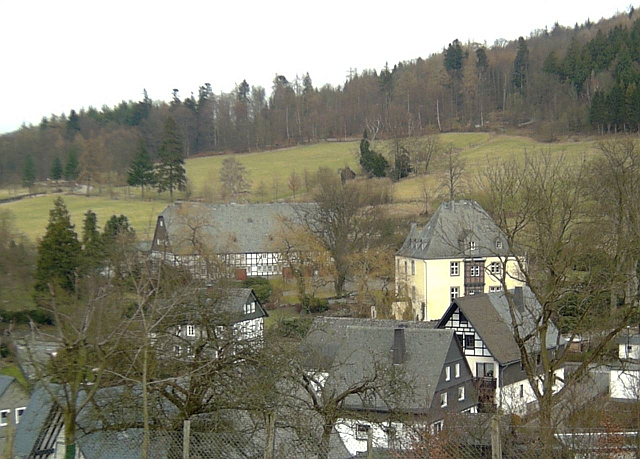 Blick auf Schloss Bruchhausen (OLsberg-Bruchhausen) , Germany.